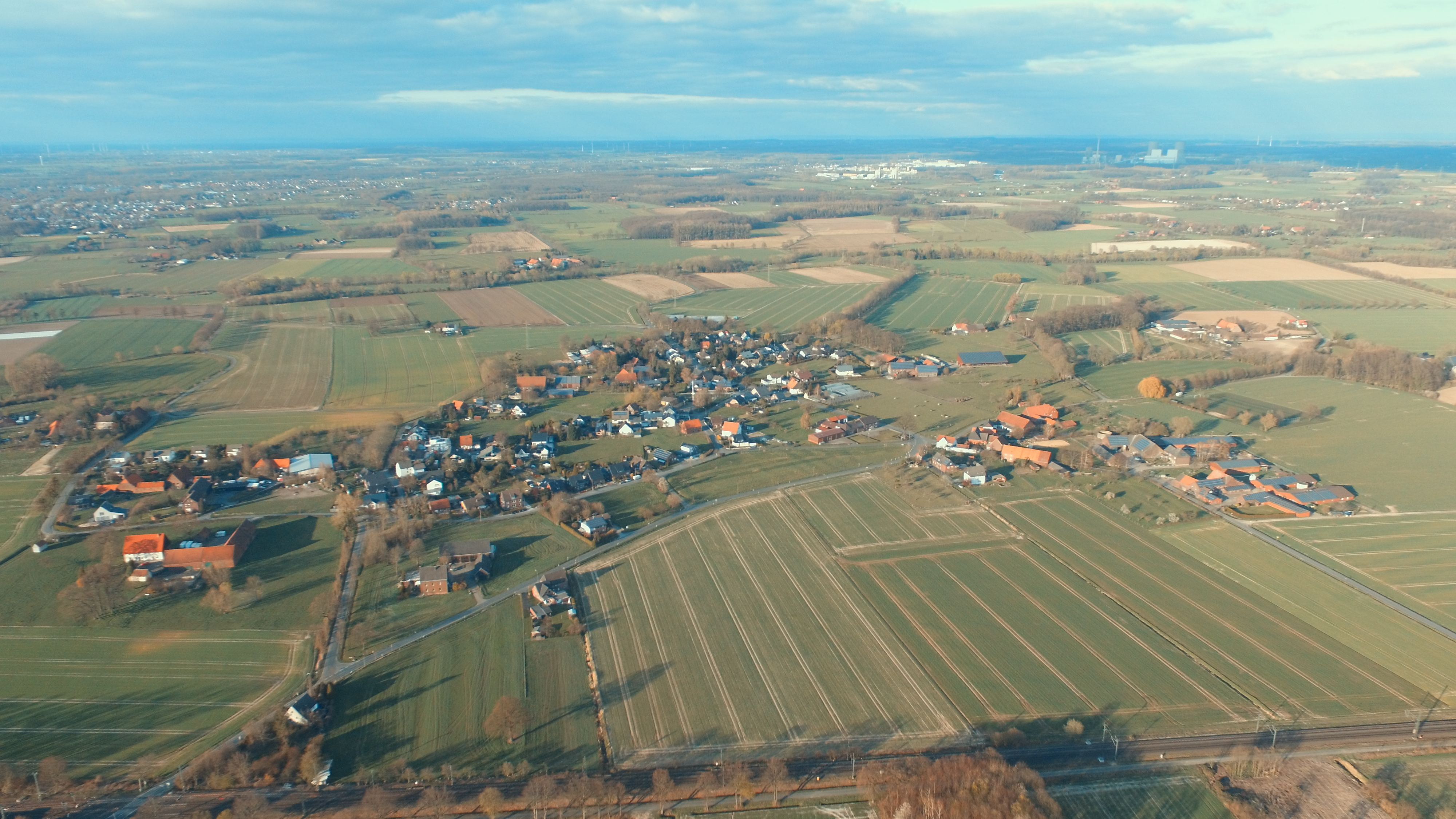 Aufgenommen in Blickrichtung Nord-Ost.